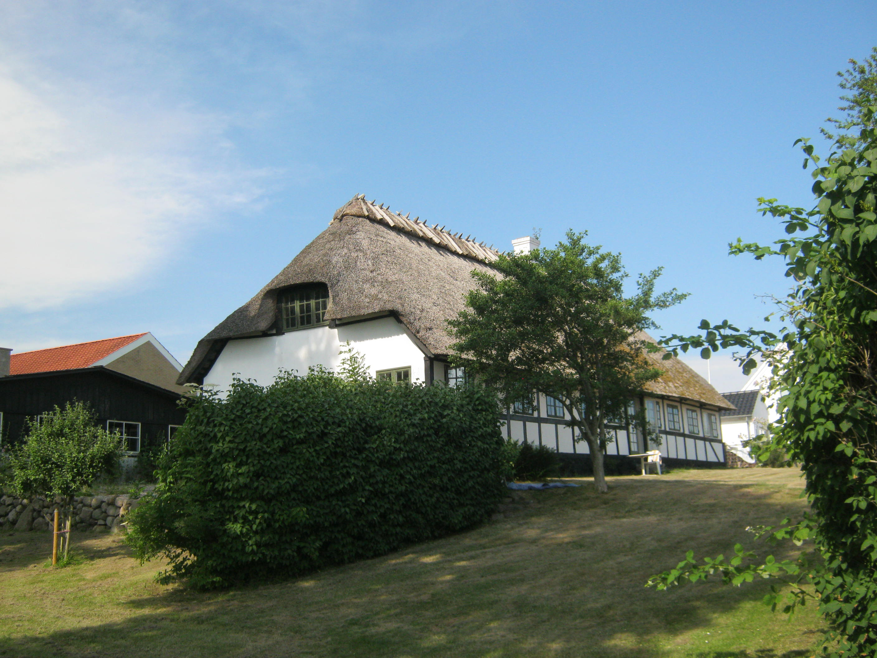 Brecht-Haus in Svendbotg